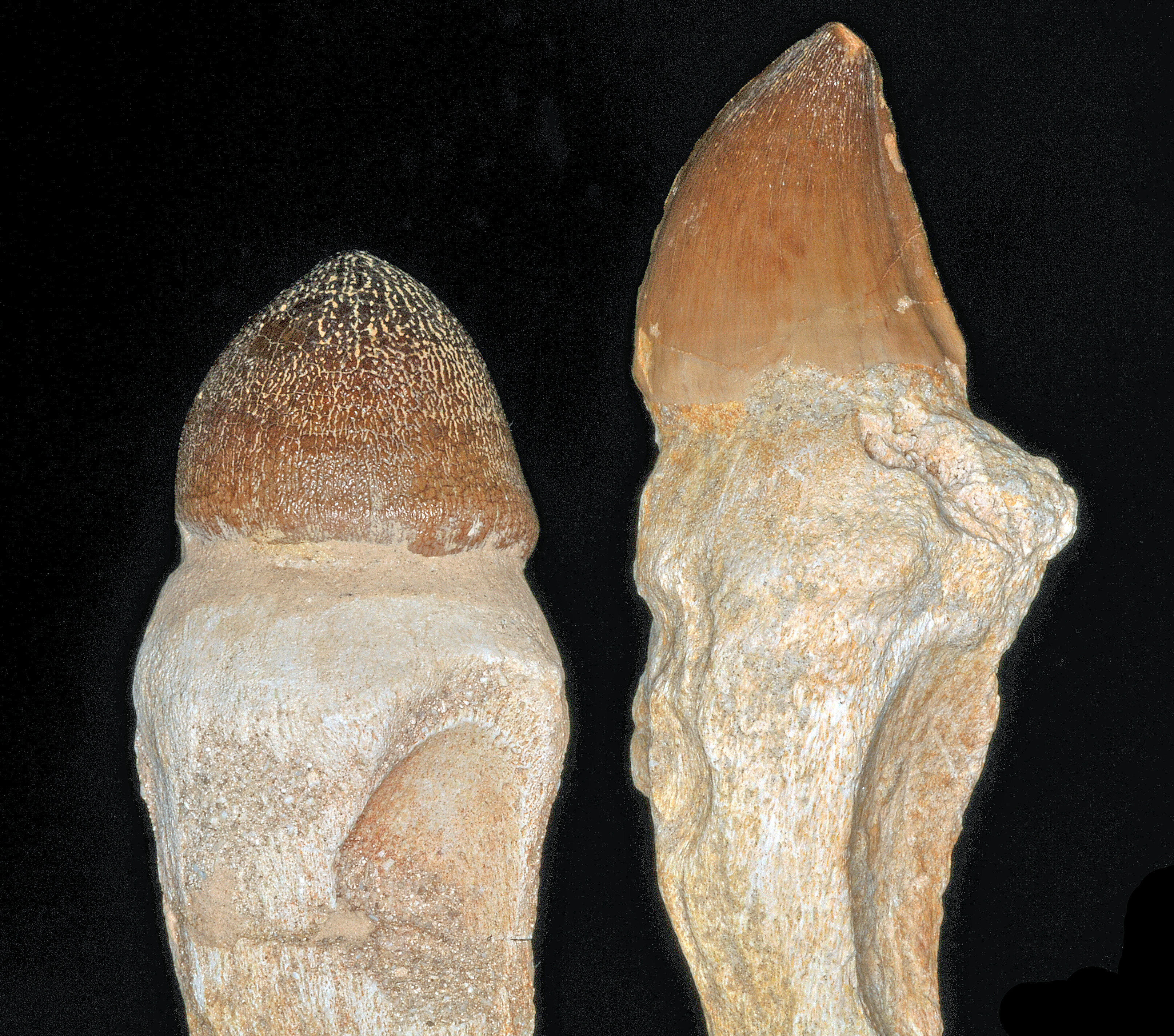 dent de Globidens aegyptiacus et dent de Mosasaurus beaugei montrant les cavités de la dent de remplacement